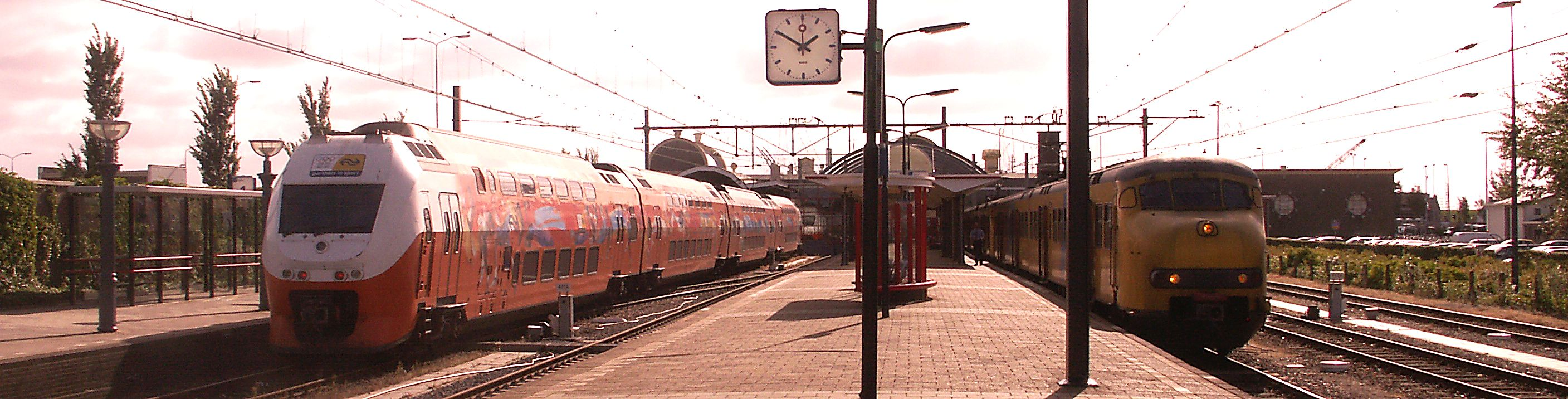 Dosto-Zug in Vlissingen